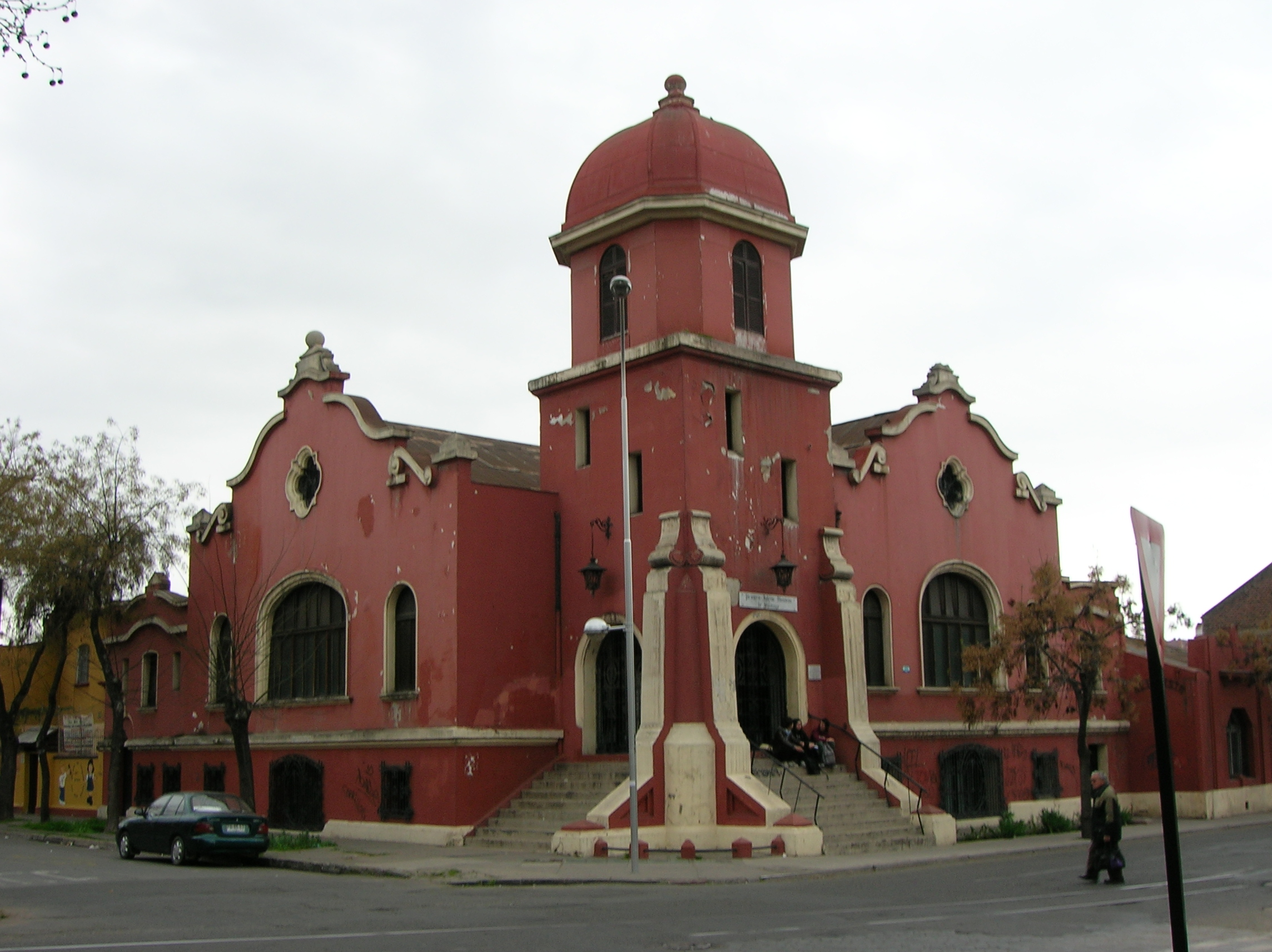 Edificio de la Primera Iglesia Metodista de Santiago (IMECH)